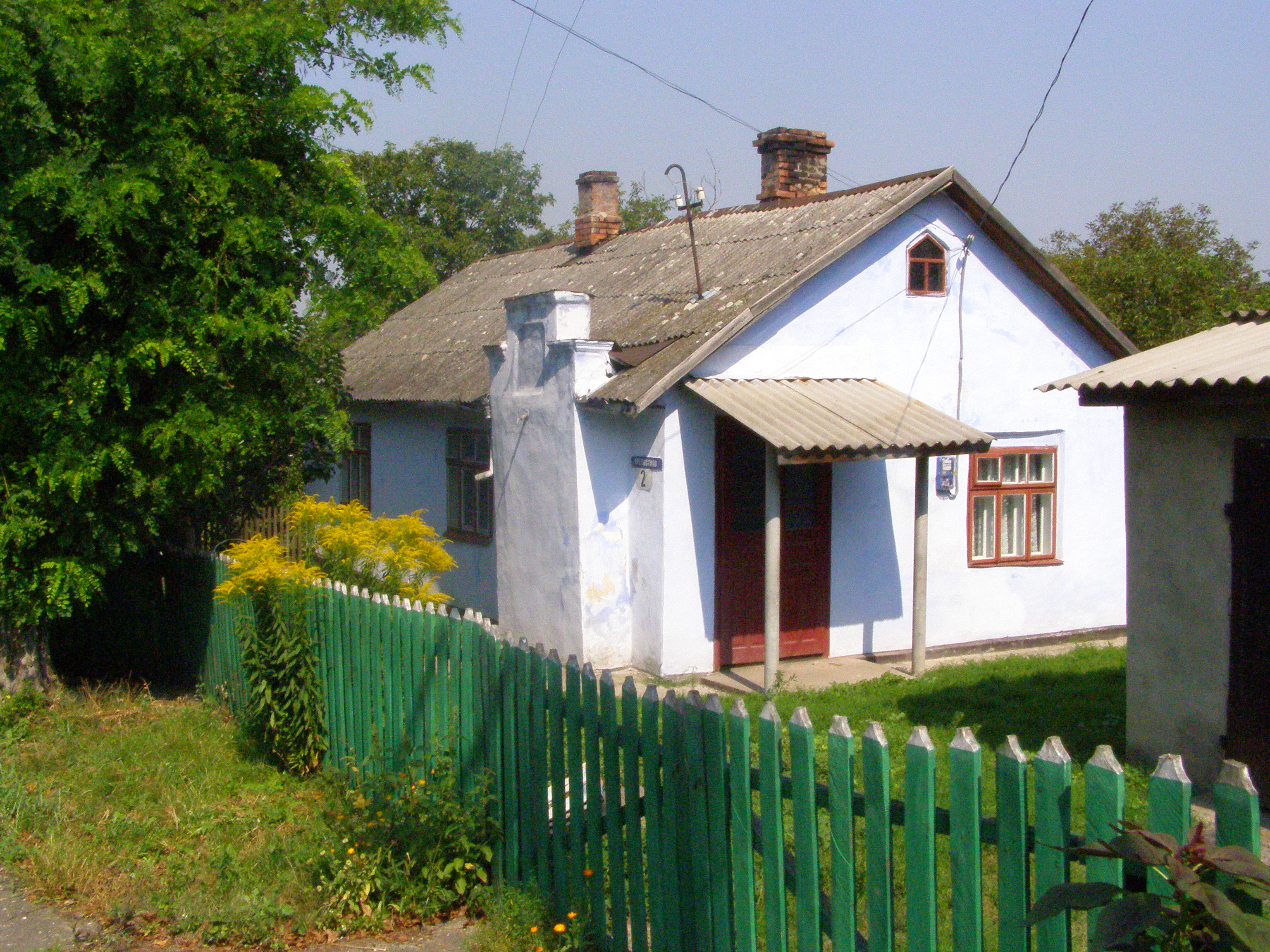 Chotyn, dům